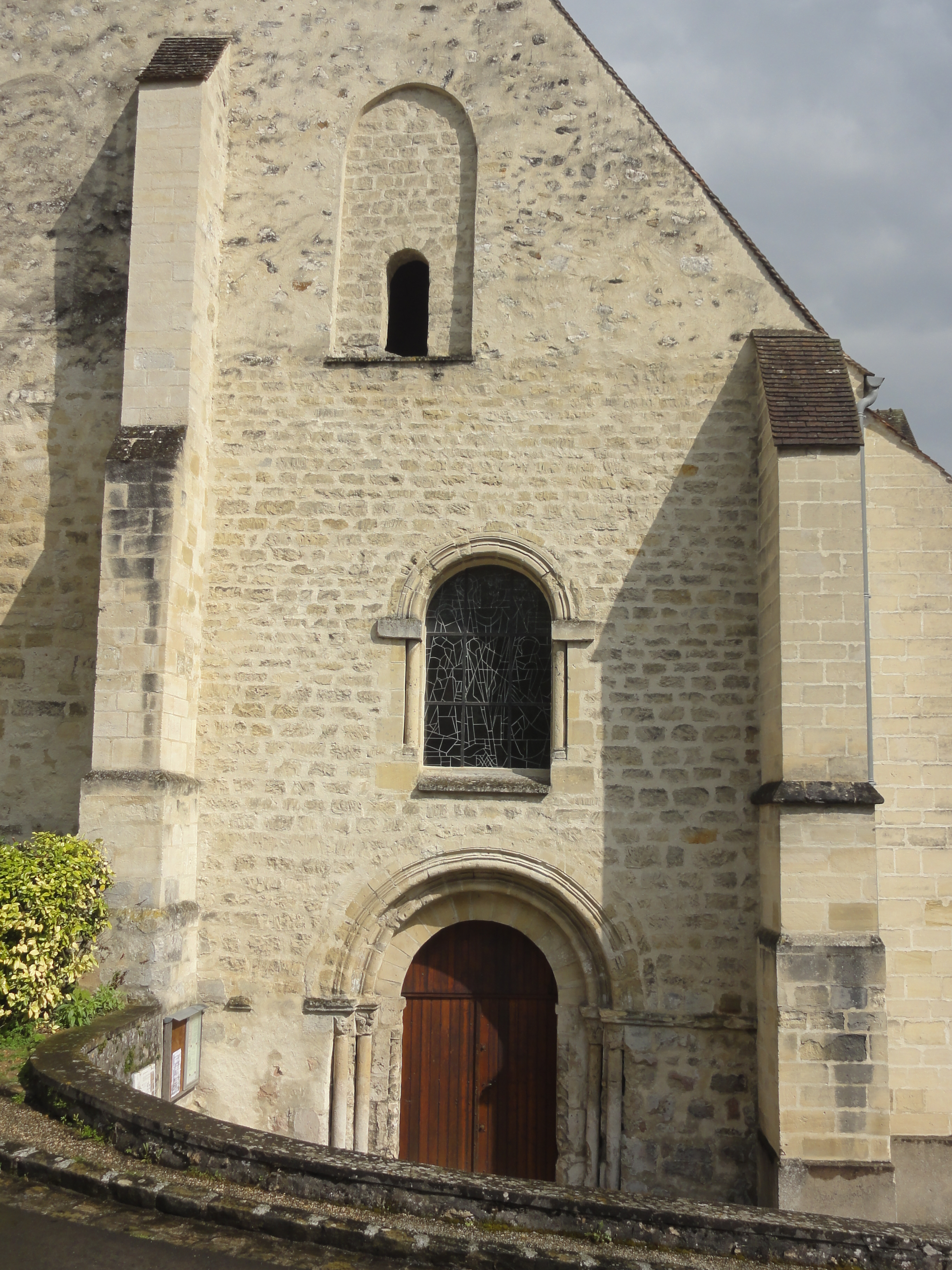 Église Saint-Pierre-aux-Liens de Vaux-sur-Seine - voir titre.